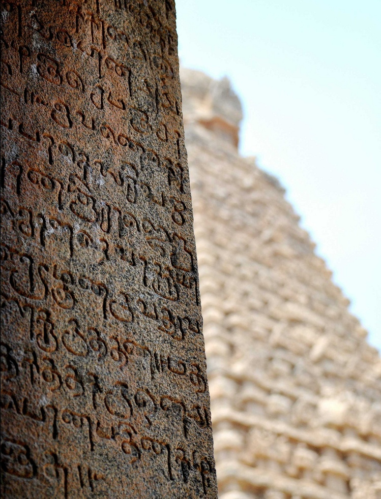 Vatteluttu Tamil found on Tanjavur, Bragadeeshvara temple. Tamil Nadu, India